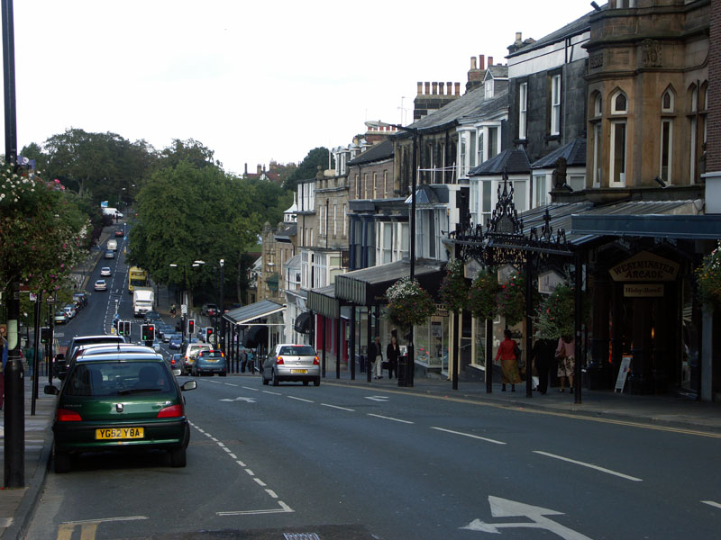 Harrogate (North Yorkshire) - Parliament Street